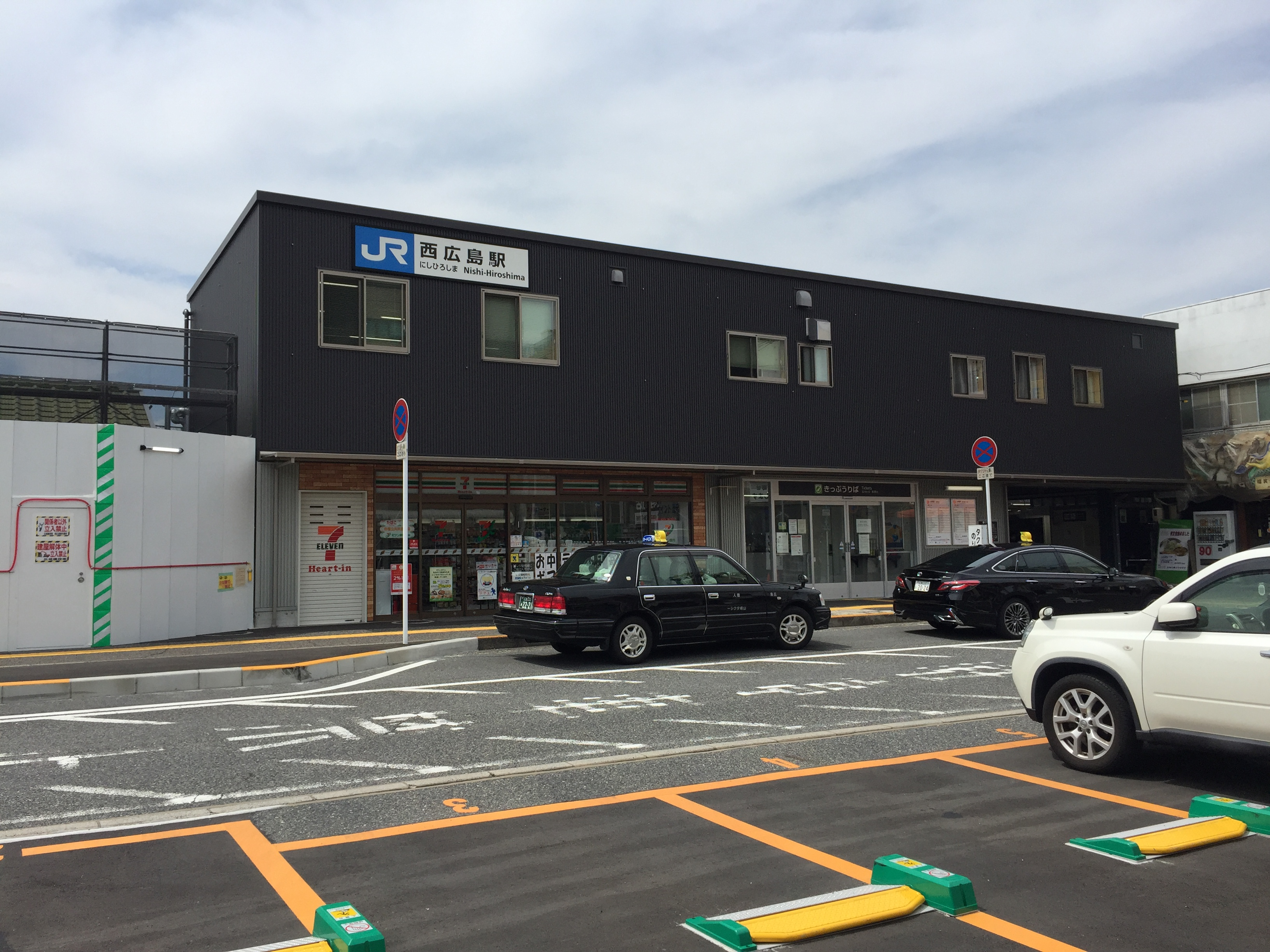 西広島駅の橋上化までの暫定駅舎